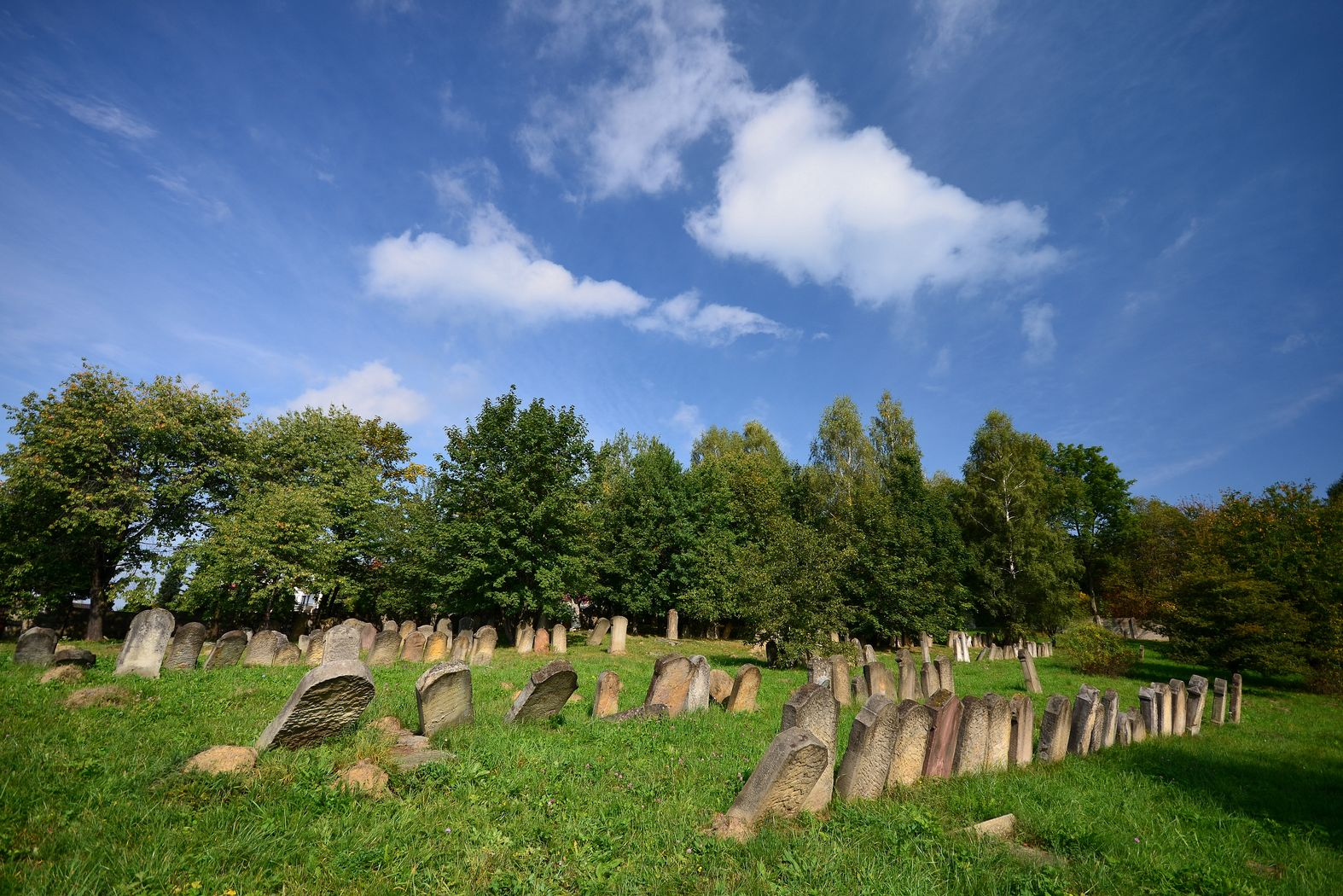 cmentarz żydowski Krosno, Krosno